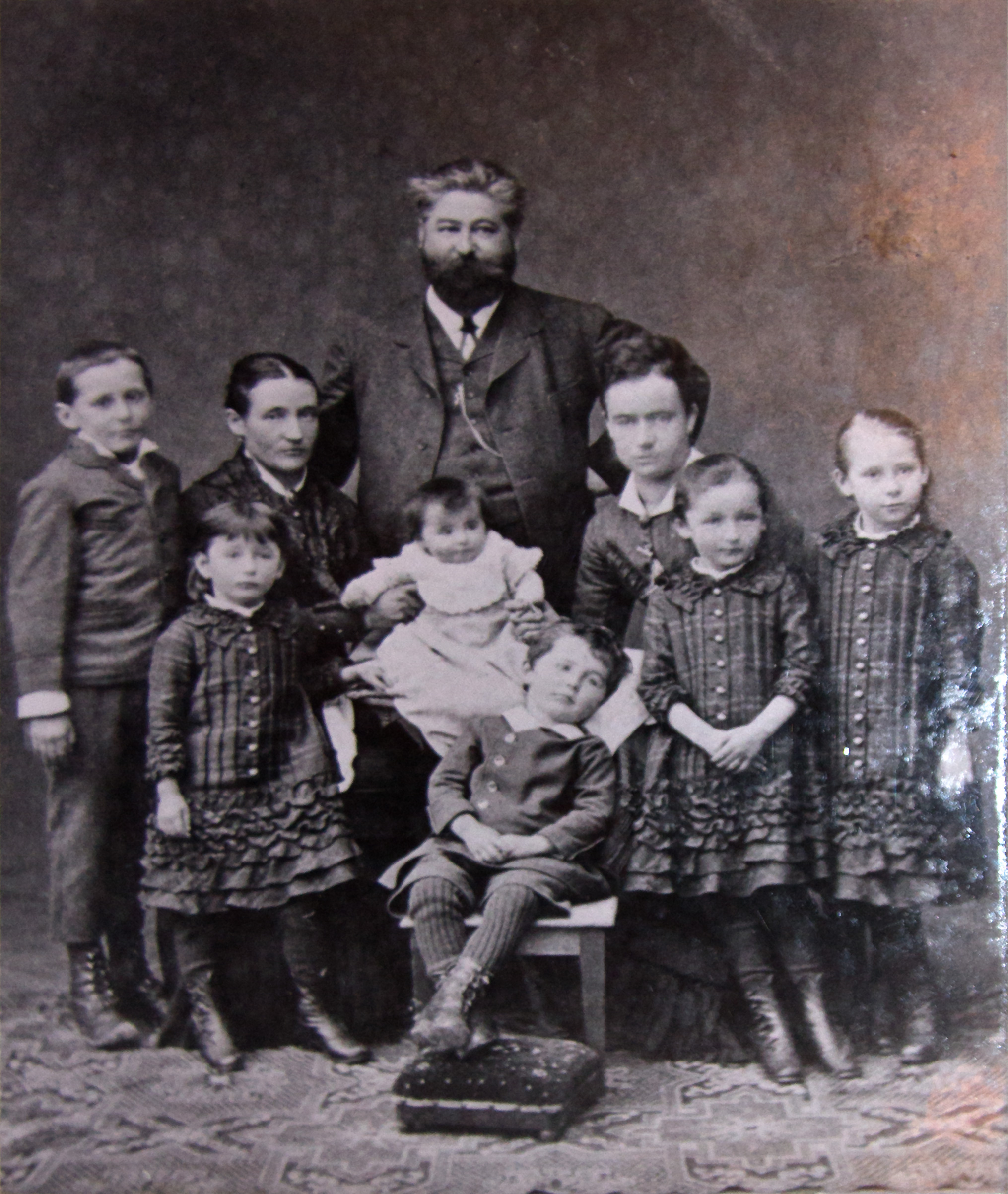 Hotelier Florian Stoppany mit seiner Frau Betty und seinen Kindern, ca. 1885